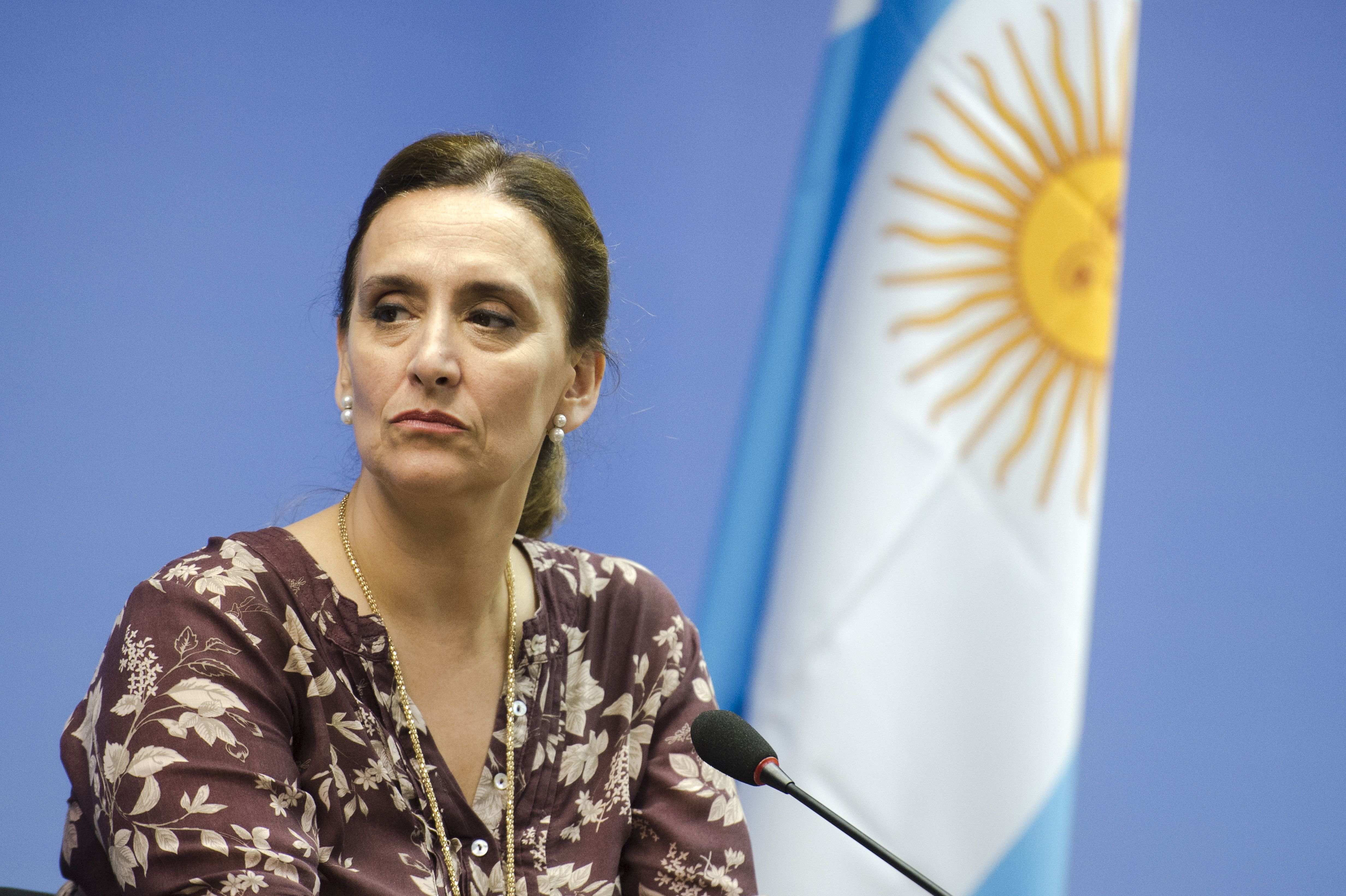 Brasília - A vice-presidenta da Argentina, Gabriela Michetti, durante entrevista coletiva no Palácio Itamaraty.